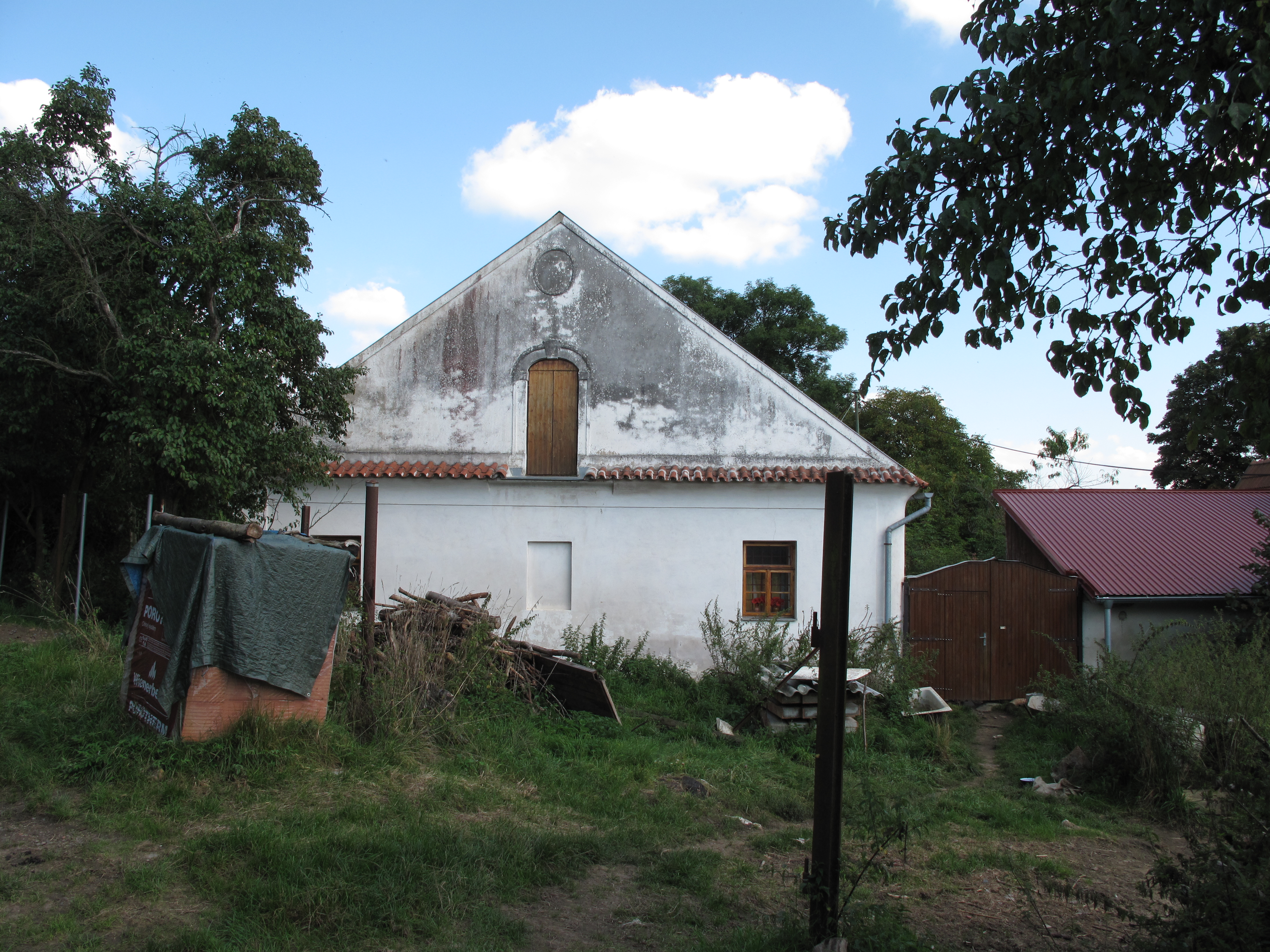 Fasáda v Radějovicích. Okres Benešov, Česká republika.